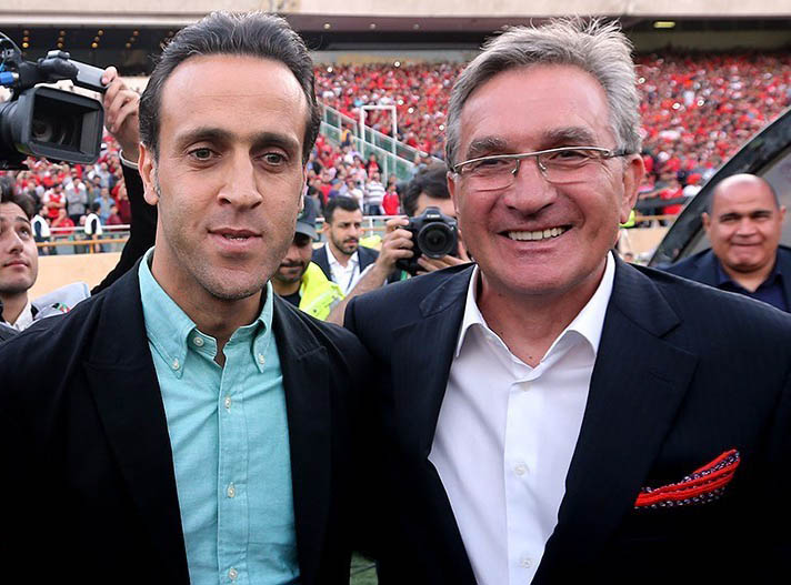 علی کریمی و برانکو ایوانکویچ - دیدار پایانی لیگ برتر هفدهم - پرسپولیس ۳ - سپیدرود ۰